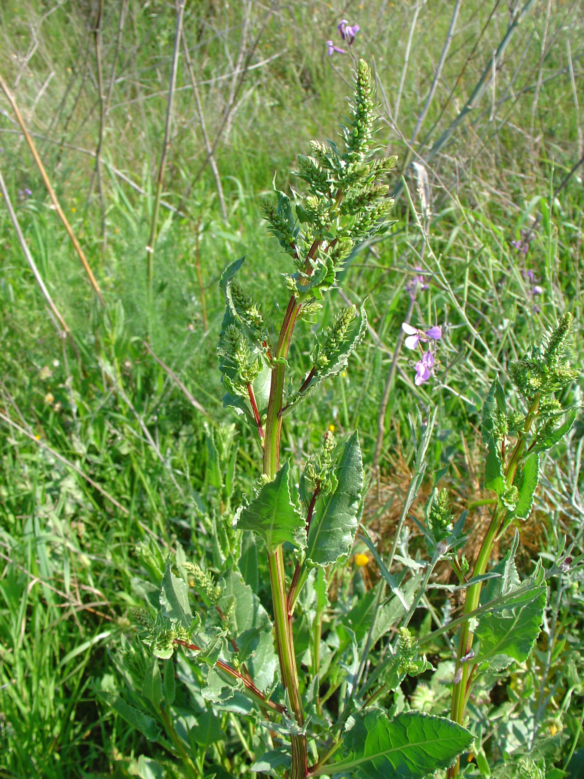 Rumex crispus procedente de margen de camino en Sierra Minera, Murcia, Spain